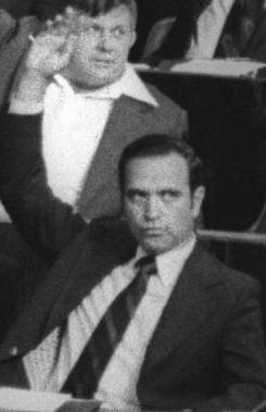 Likud Party MKs raise their hands in favor of Yitzhak Shamir as speaker of the 9th Knesset behind a glum government bench. חברי הליכוד מצביעים עבור יצחק שמיר לתפקיד יו"ר הכנסת, בפתיחת מושב הכנסת התשיעית, בירושלים. Photo: SAAR YAACOV, 13/06/1977